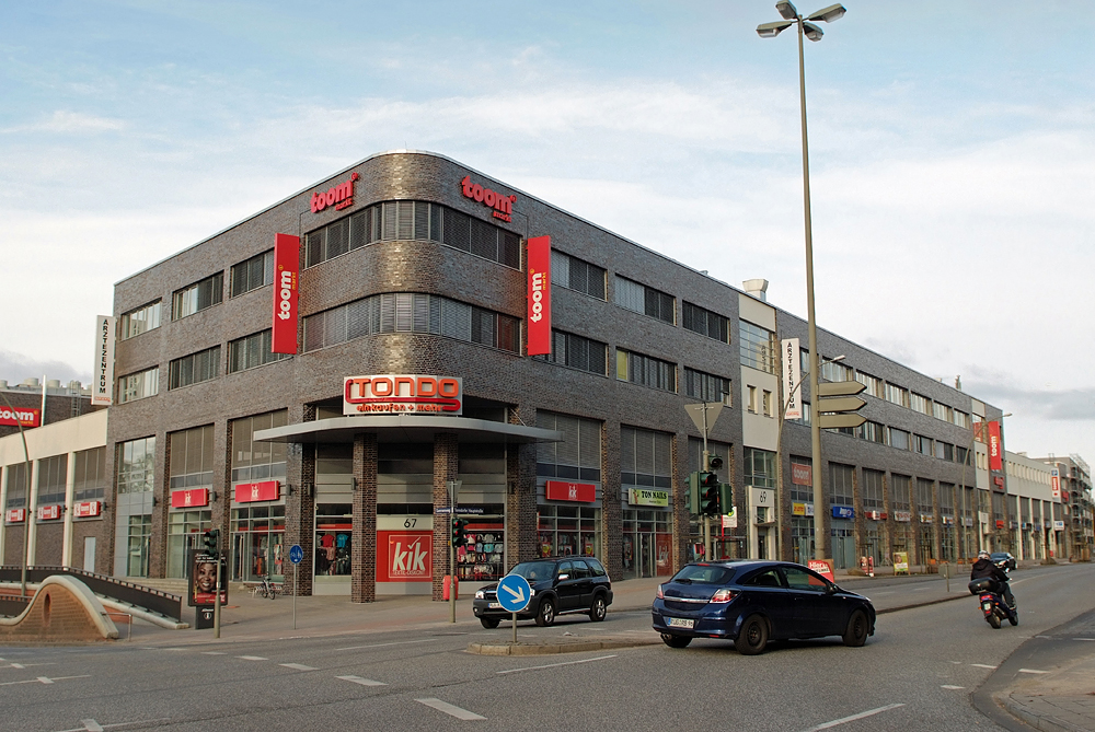 Einkaufszentrum "Tondo" in Hamburg-Tonndorf Blickrichtung von der Jenfelder Allee, rechts: Tonndorfer Hauptstraße